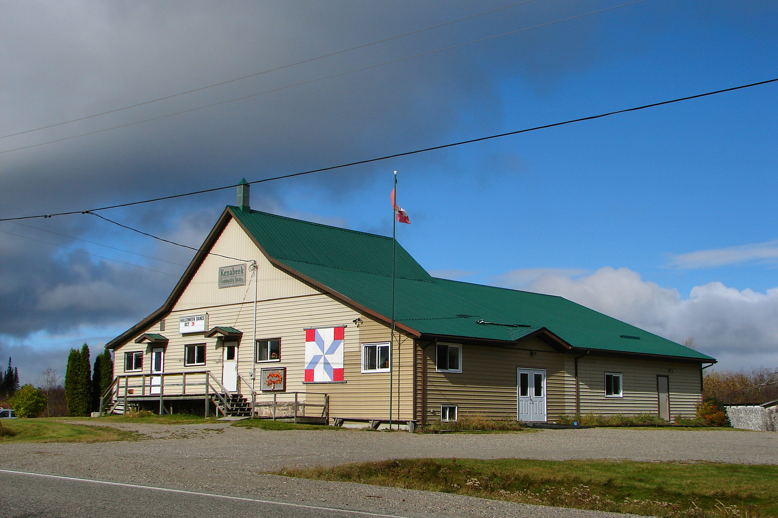 Kenabeek, Ontario, Canada